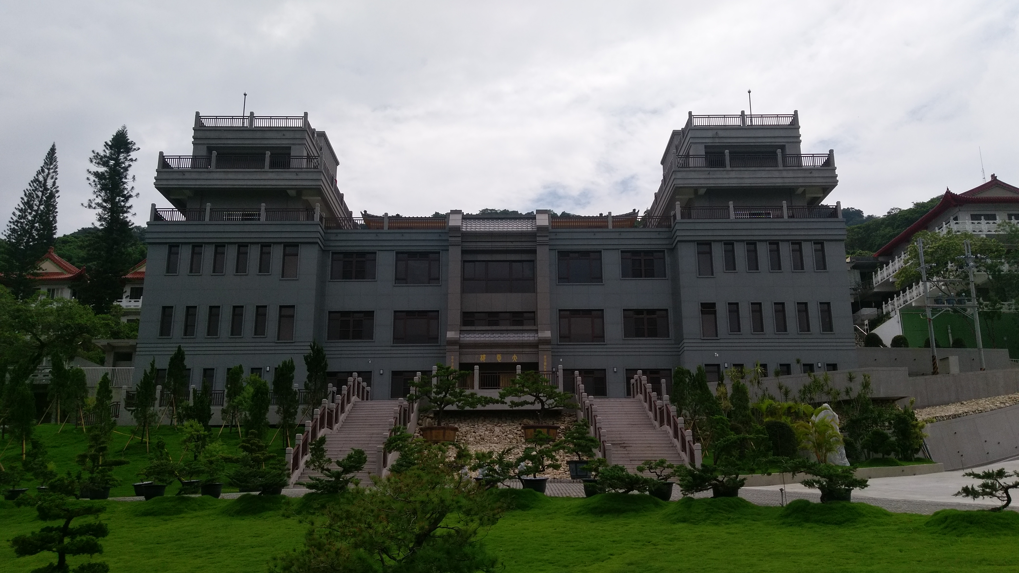 中文（台灣）: 高雄阿蓮大崗山龍湖庵大悲樓於2017年拆除，2020年重建落成